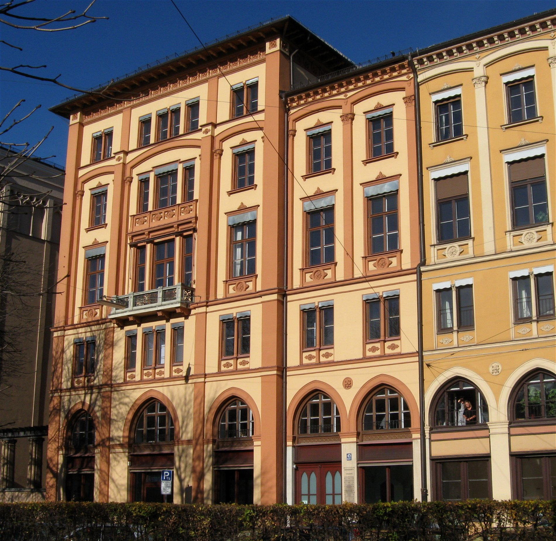 Maximilianstraße 43; Erhöhter Eckbau, Maximilianstil, 1858-59 von Friedrich Bürklein, bildet mit Nr. 45 und 47 einen symmetrischen Block.